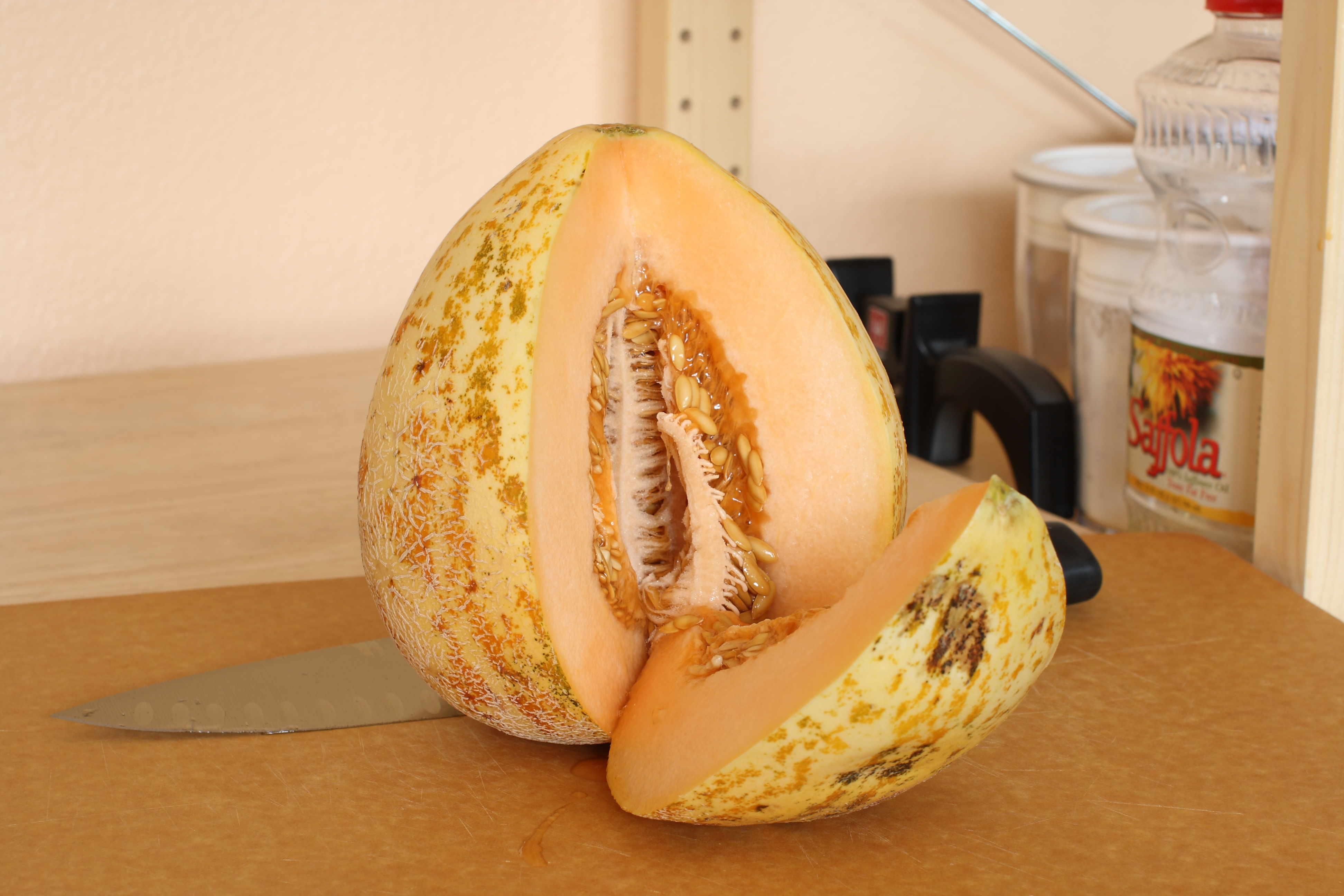 Flickr description Sunnyvale, CA